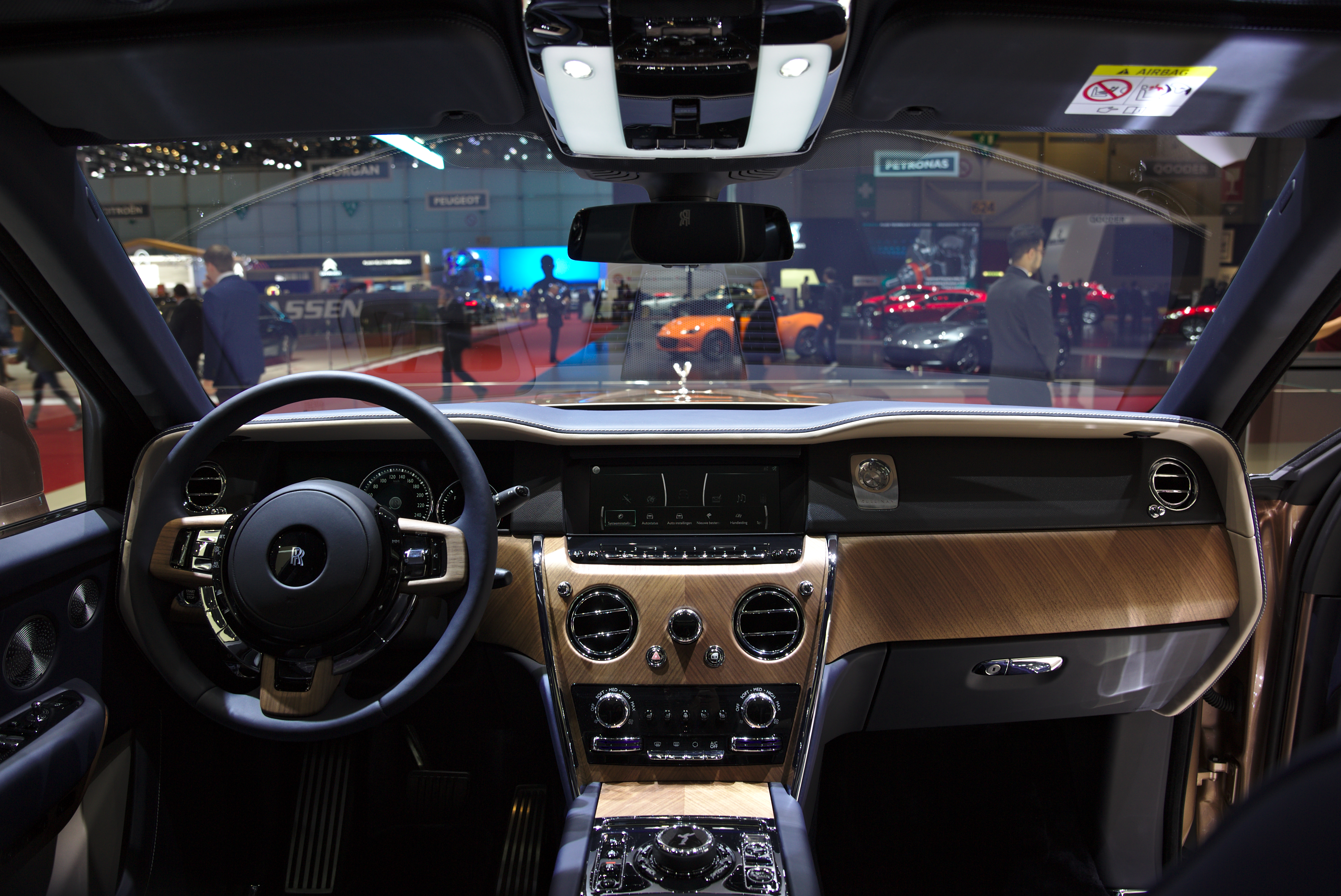 Rolls-Royce Cullinan at Geneva Motor Show 2019